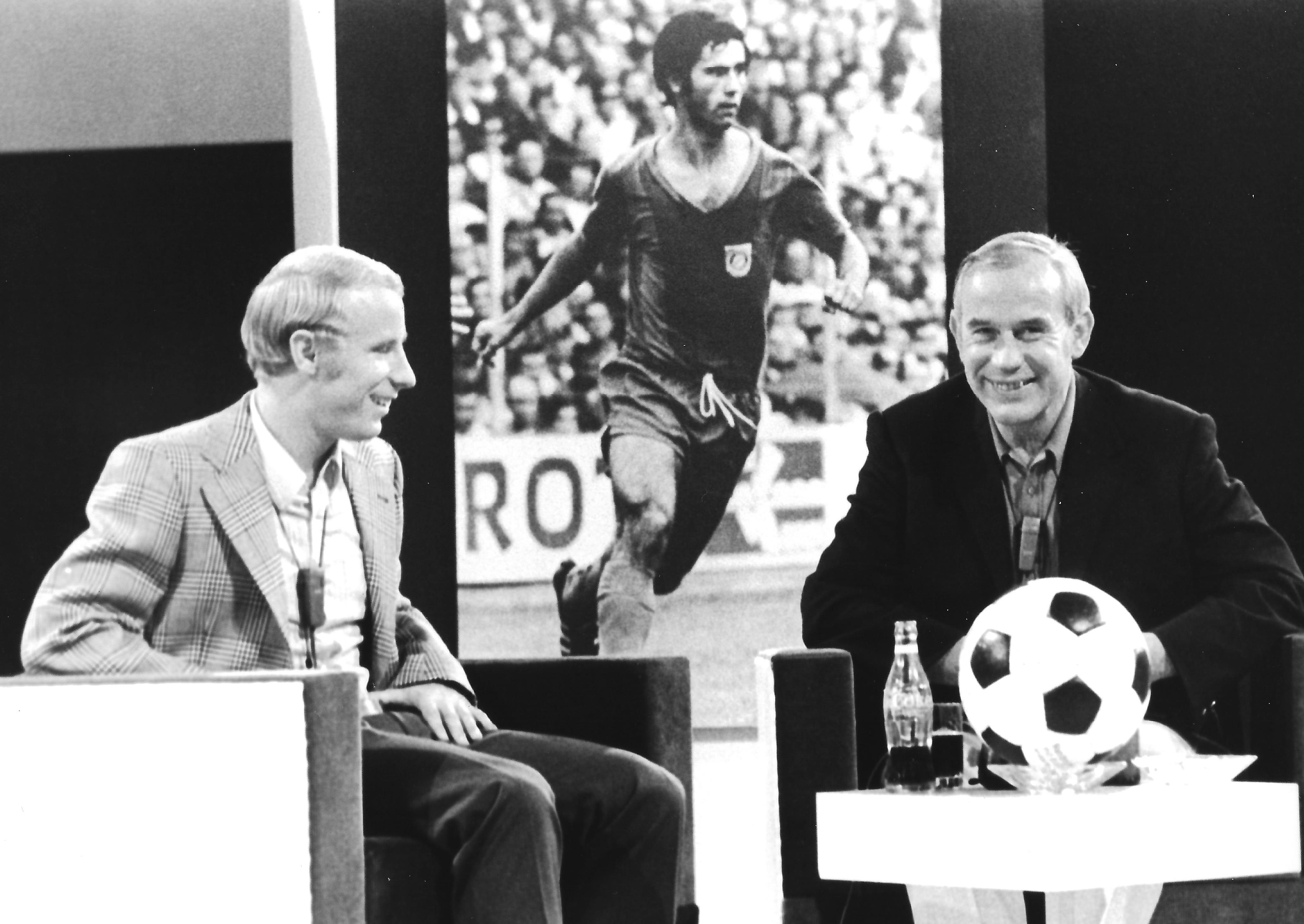 Berti Vogts und Hennes Weisweiler, Funkausstellung Düsseldorf 1970